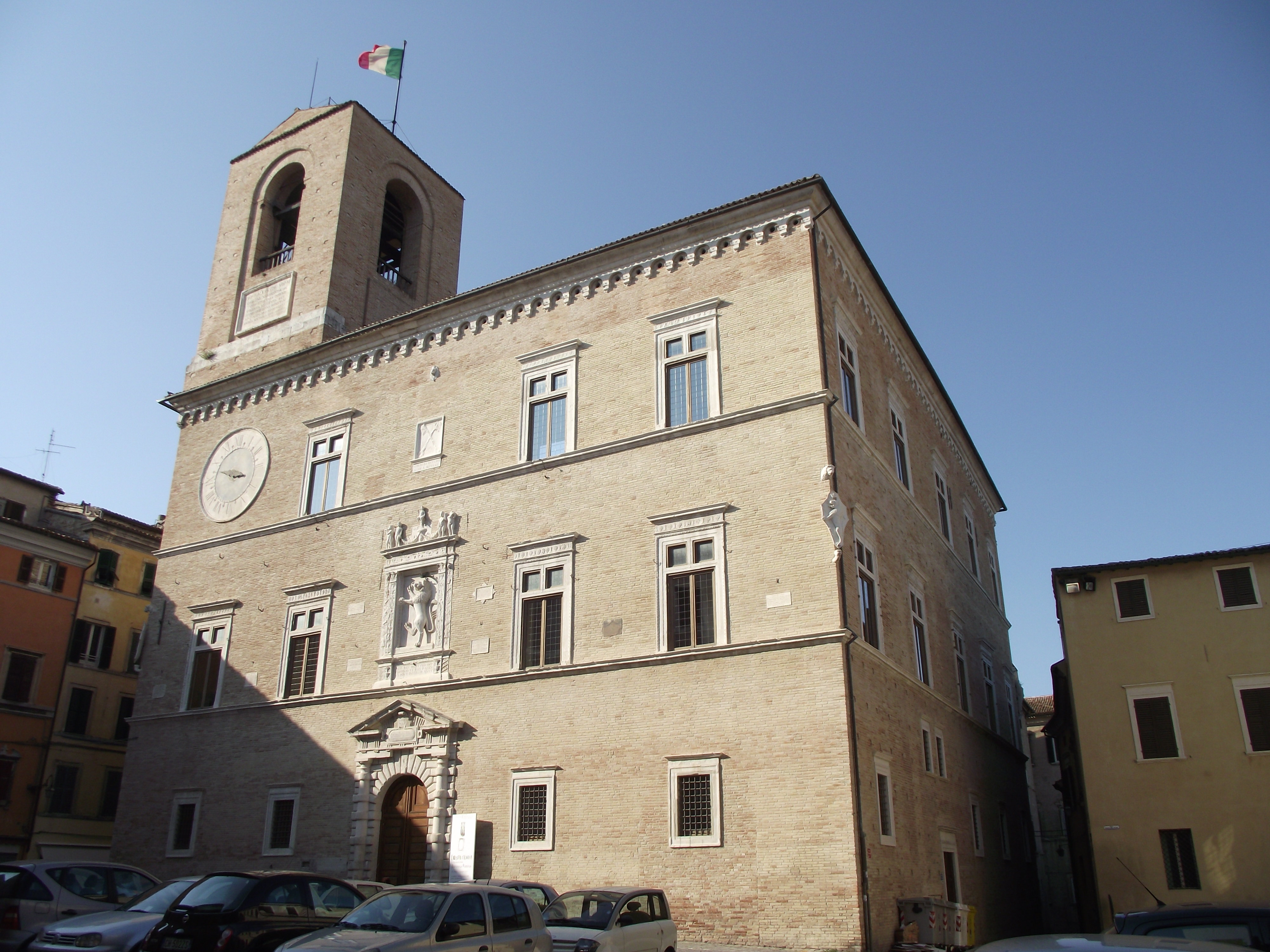 Jesi, Palazzo della Signoria, F.di G.Martini, 1486-98